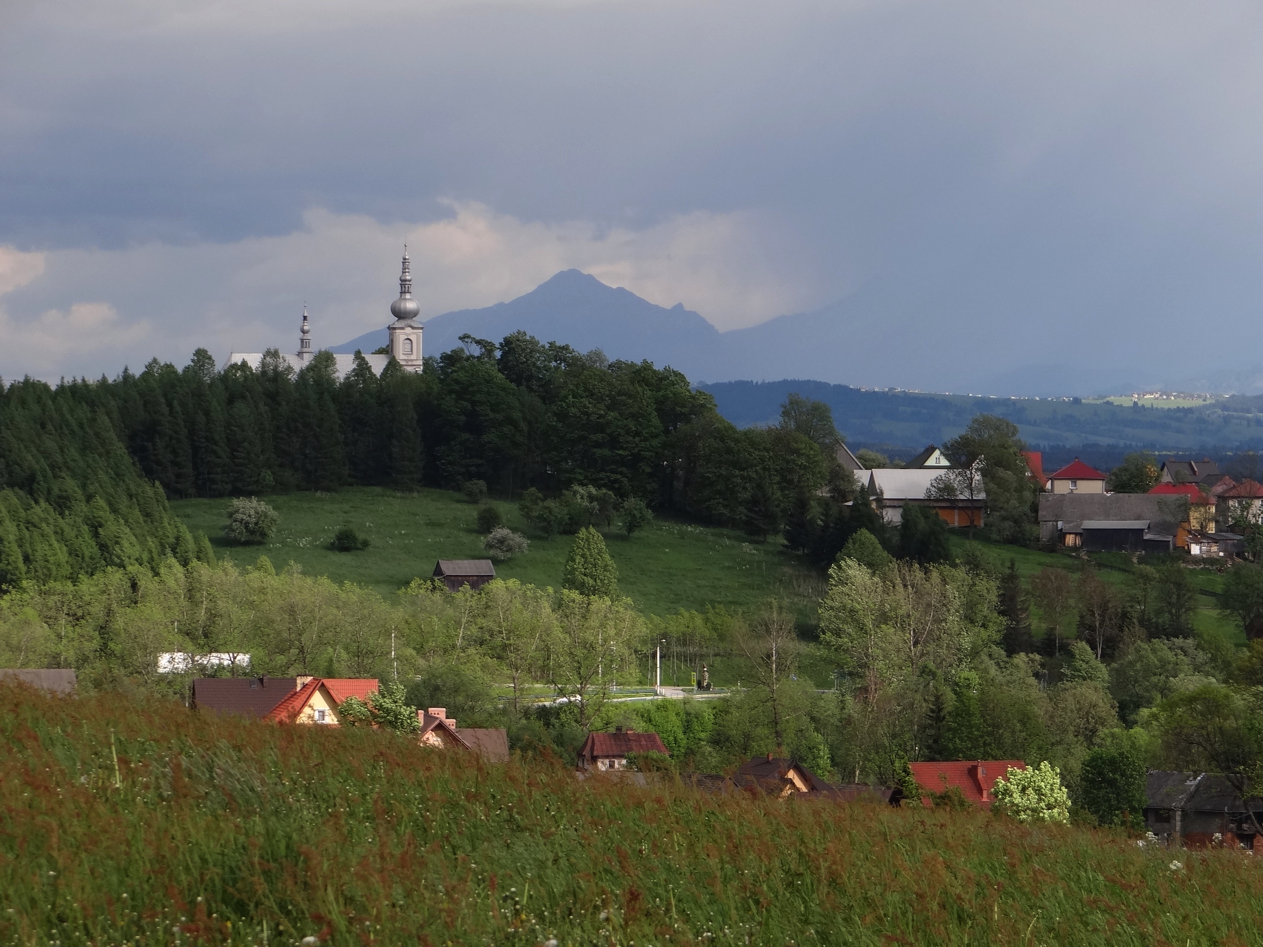 Jabłonka (województwo małopolskie) i widok na Tatry